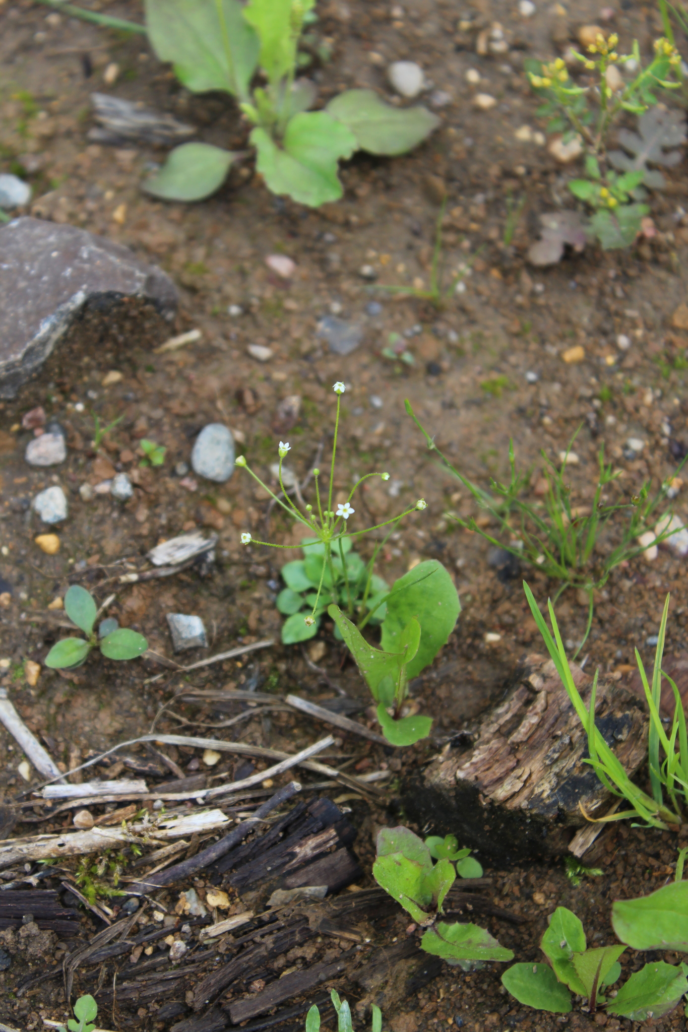 Проломник нитевидный